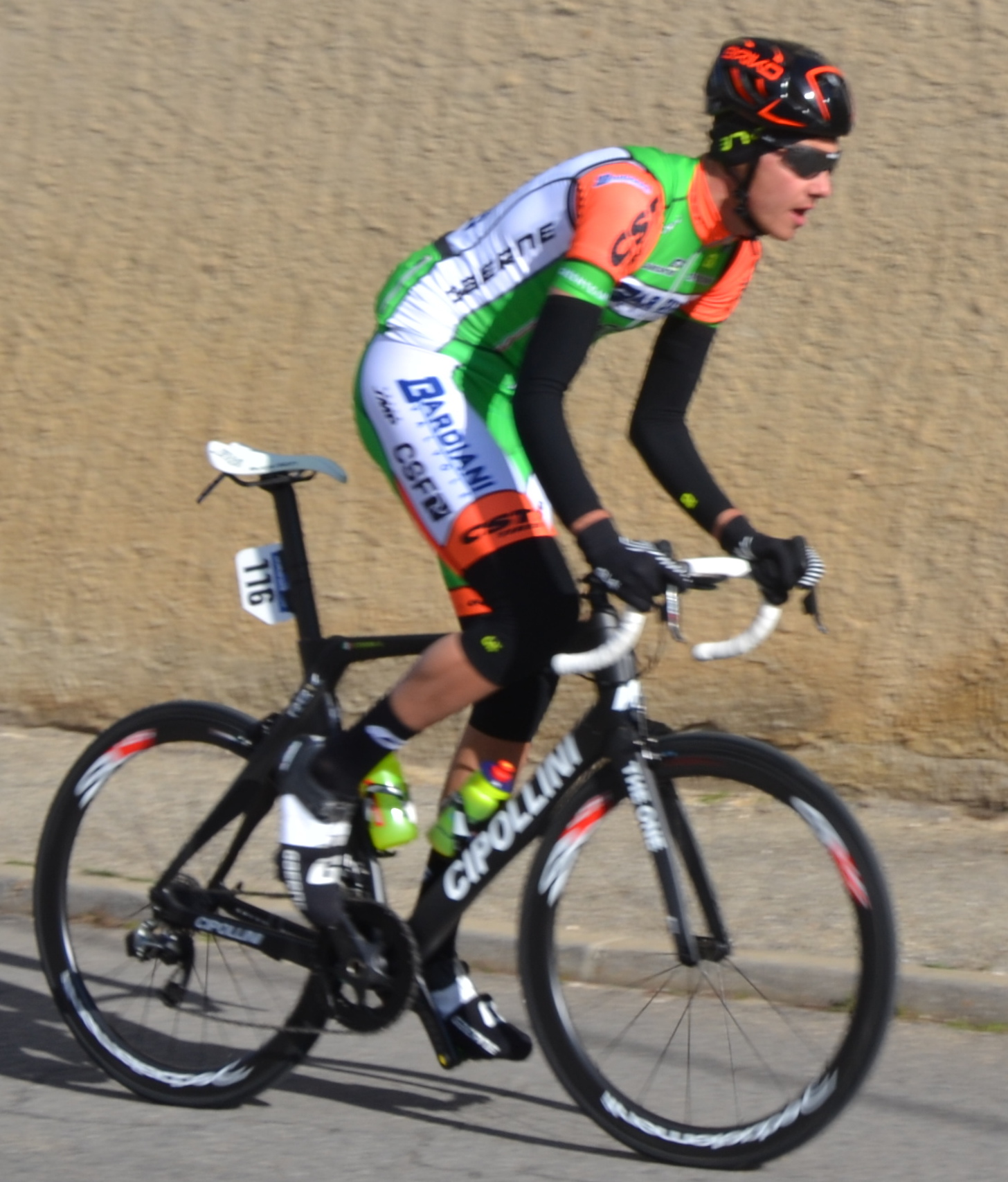 Simone Sterbini lors de Bessèges 2018